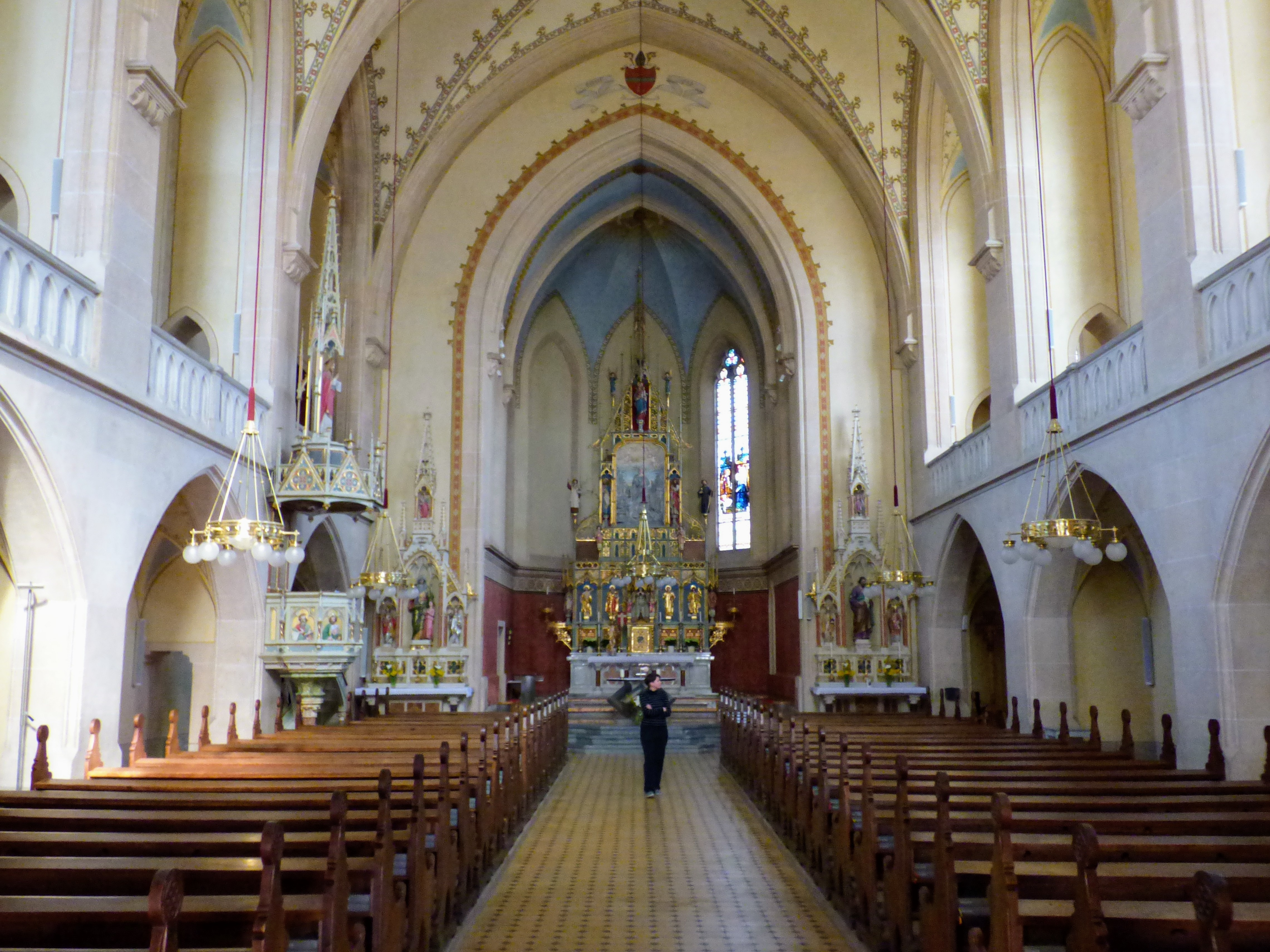 Pfarrkirche hl. Veit, Weißkirchen in Steiermark.